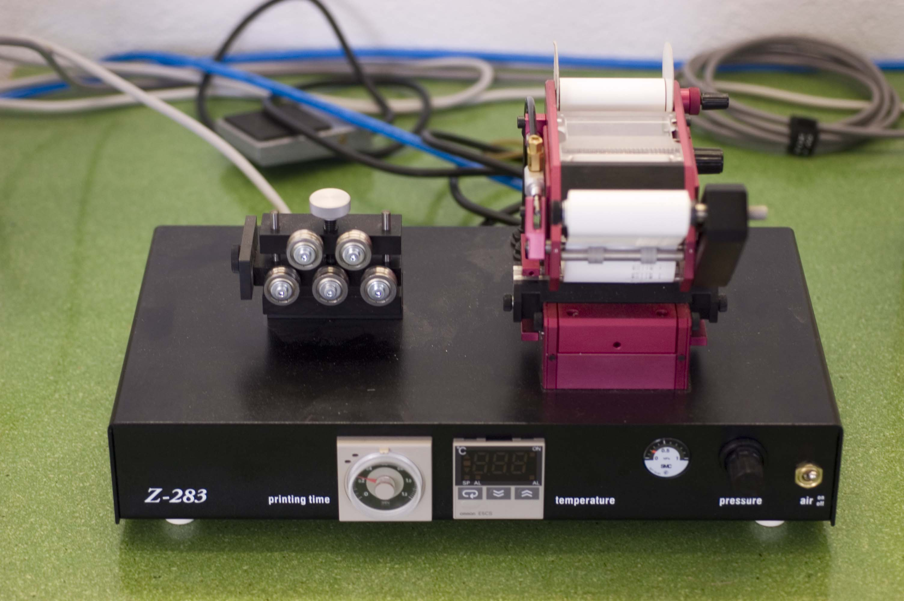 Ort: BHW St.Jakob Zürich